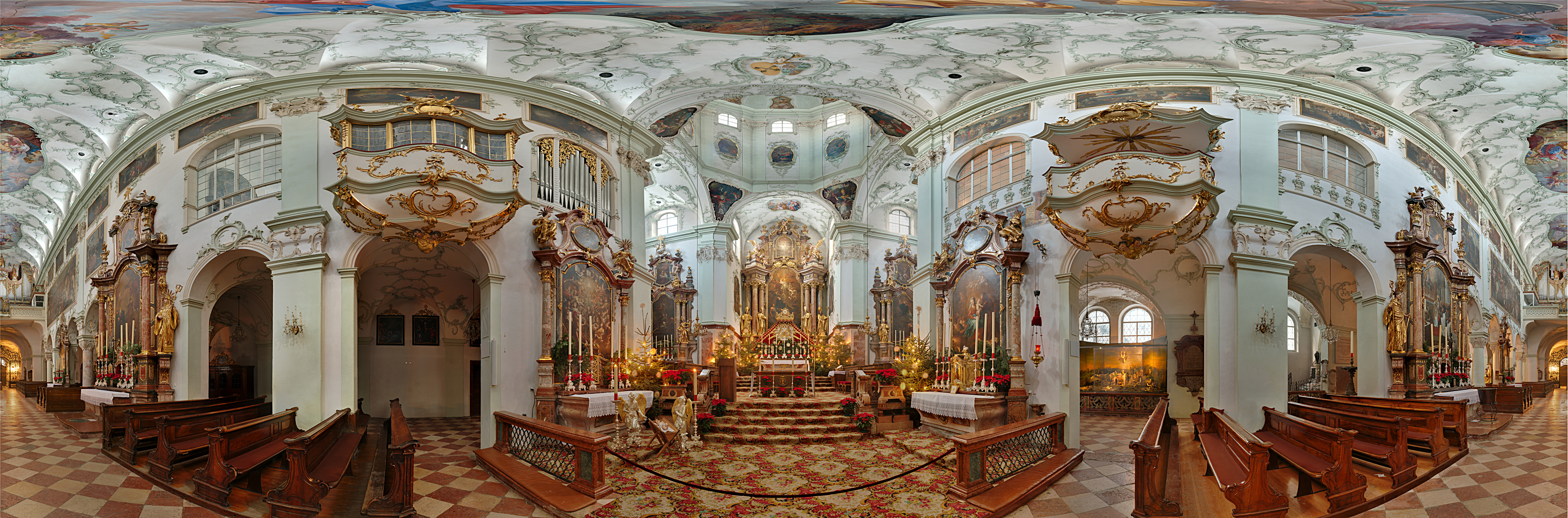 Panorama der Stiftskirche St.Peter in Salzburg.